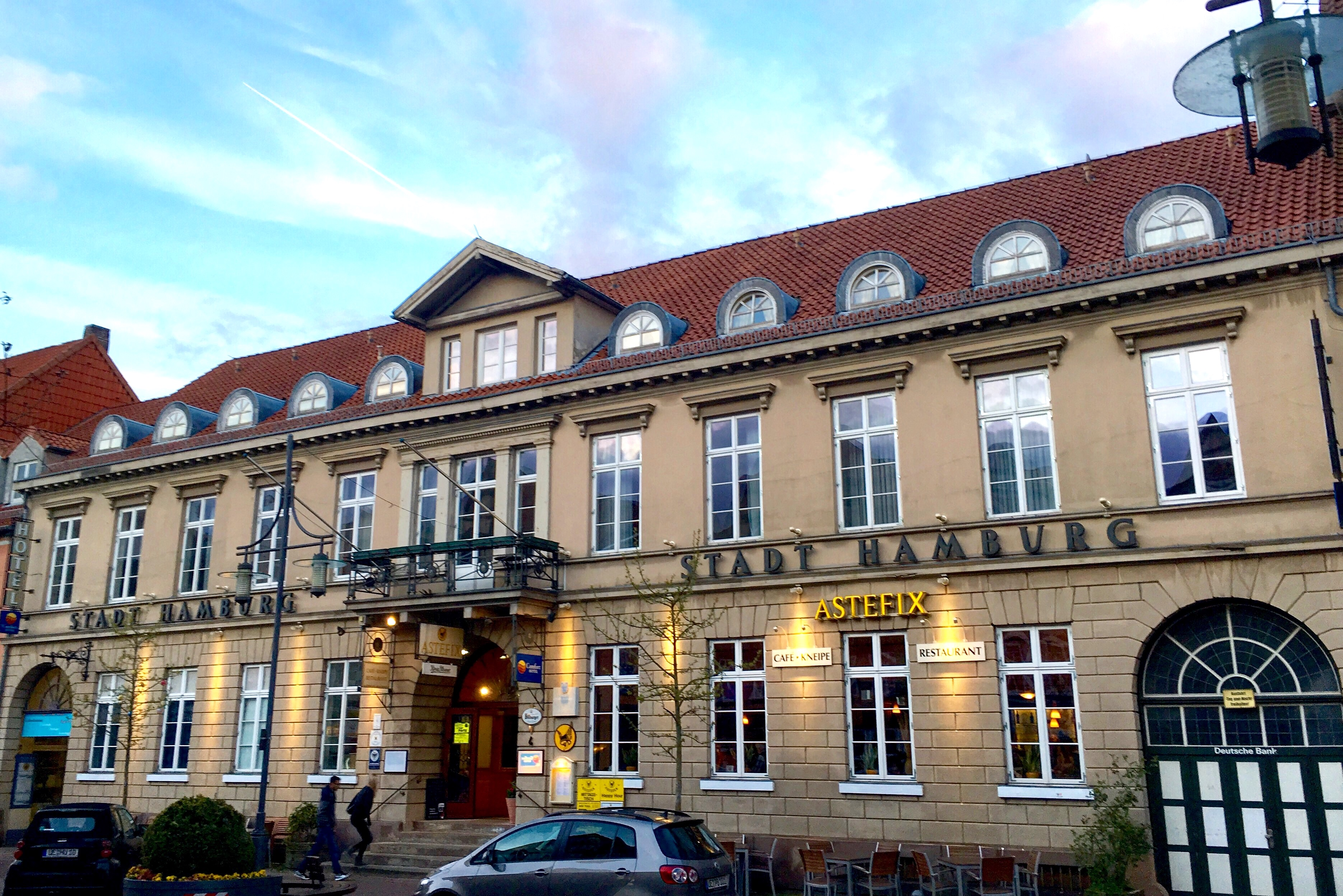 Hotel Stadt Hamburg in der Lüneburger Straße, Uelzen